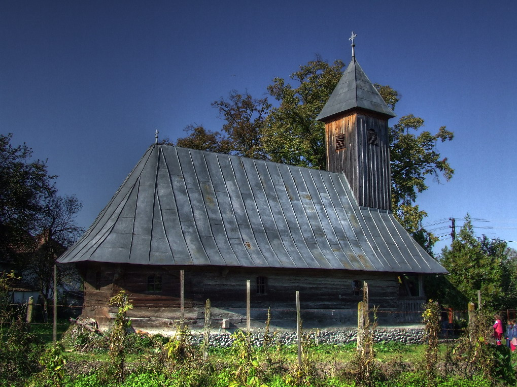 Biserica de lemn din Beica de Jos, judeţul Mureş, vedere din nord.